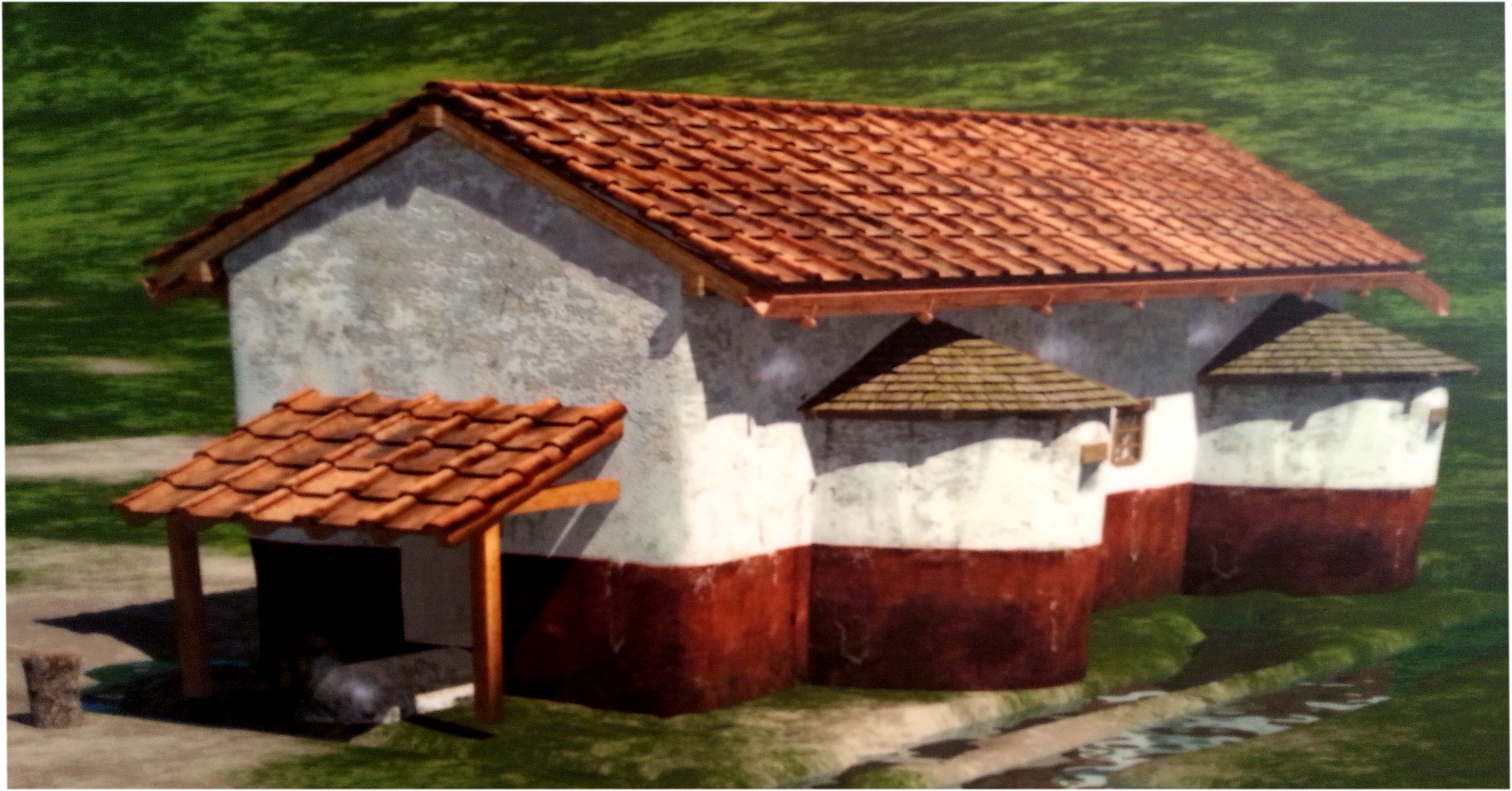 3D Rekonstruktion des römischen Badehauses von Schlögen (Hochgupf).